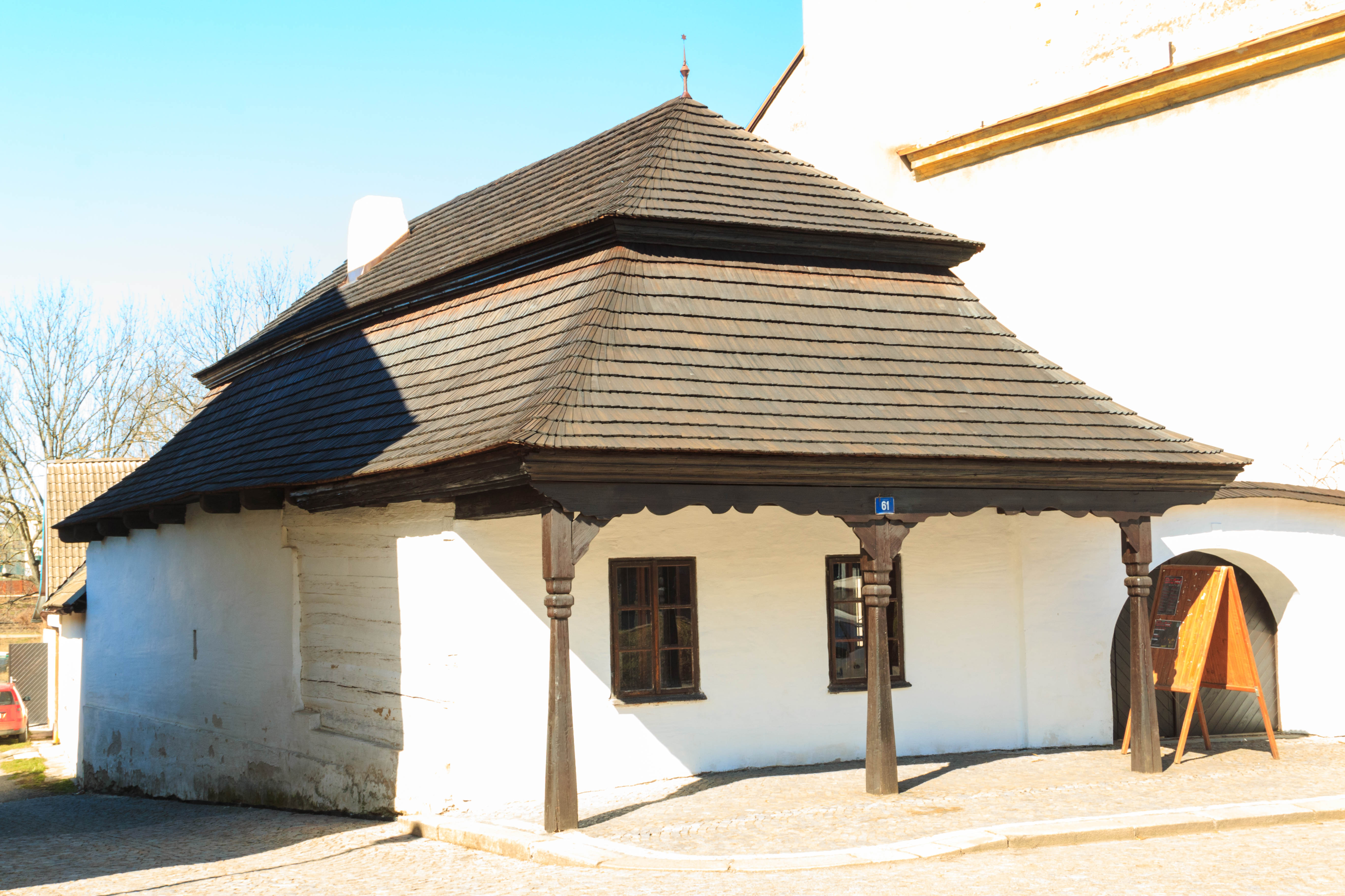 Venkovský dům T. Novákové, náměstí Dr. Tošovského 61, Proseč.